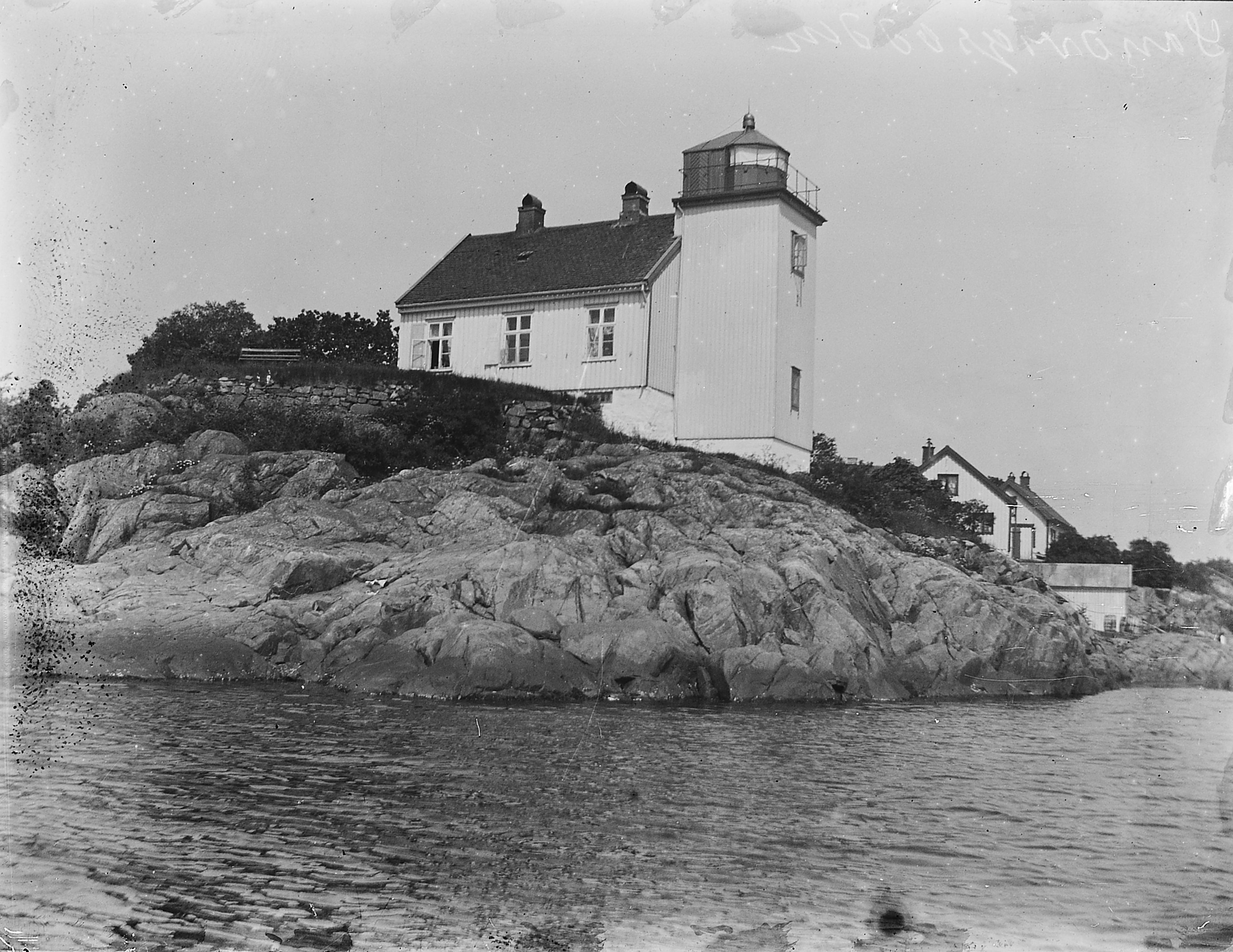 Bildet er hentet fra Arkivverket. Sandvikodden, Hisøy Arkivinstitusjon : Riksarkivet Arkivnavn : Fyrdirektoratet Sted : Norge, Aust-Agder, Arendal, Hisøy Emneord: Fyr, Kyst Avbildet